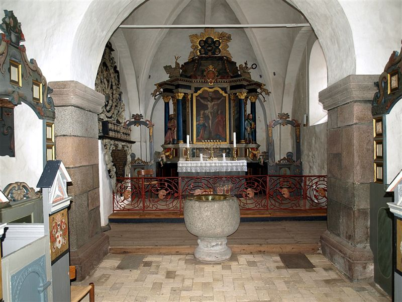 Rødding Kirke, (Viborg Kommune), Korbue og kor